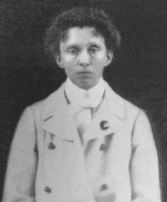 Ebba Hay